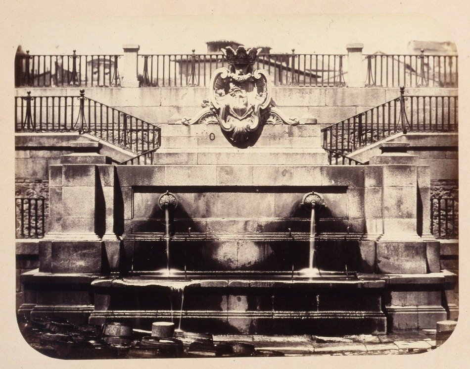 Fuente en la calle de la Escalinata. Obra en 1864 del fotógrafo toledano Alfonso Begué, muerto el 31 de octubre de 1865. Cartulina sepia. Albúmina. 43 x 32 cm. Fotografía contenida en un álbum procedente del Archivo de Villa y trasladado al Museo de Historia en 1983.